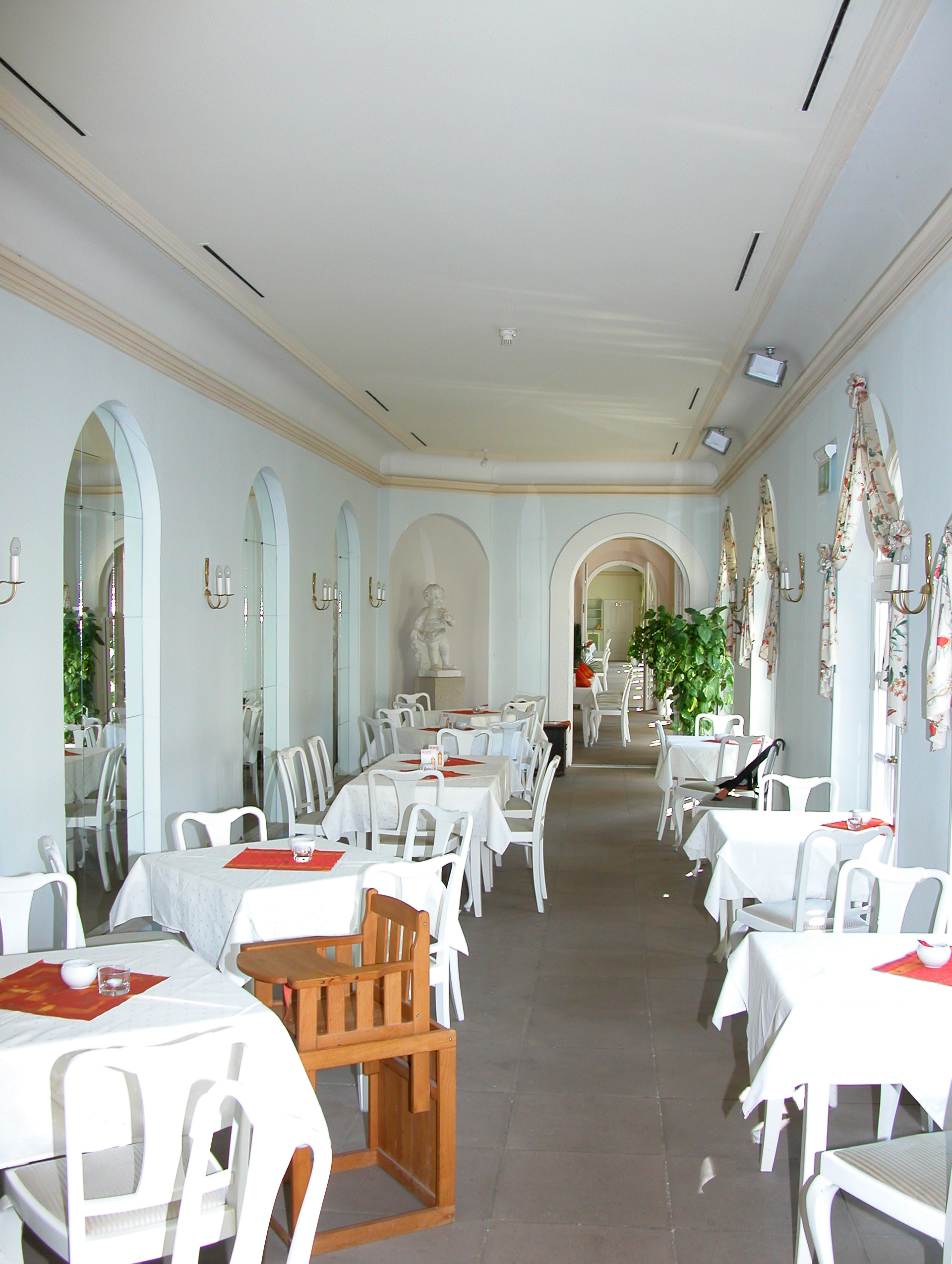 08.09.2009 04155 Leipzig-Gohlis: Gohliser Schlößchen, Menckestraße 23. 1755/56 im Auftrag des Leipziger Ratsherrn und Ratsbaumeisters Johann Caspar Richter nach Plänen von (vermutl.) Friedrich Seltendorff errichtet. Hier die Gartenseite des östlichen Anbaus, der jetzt als Café dient. Ehemals war hier die Kegelbahn und ein Billardzimmer. [DSCN38969.TIF]20090908425DR.JPG(c)Blobelt